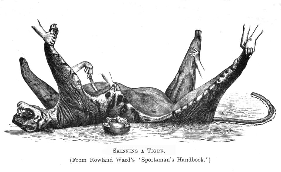 Skinning of a tiger